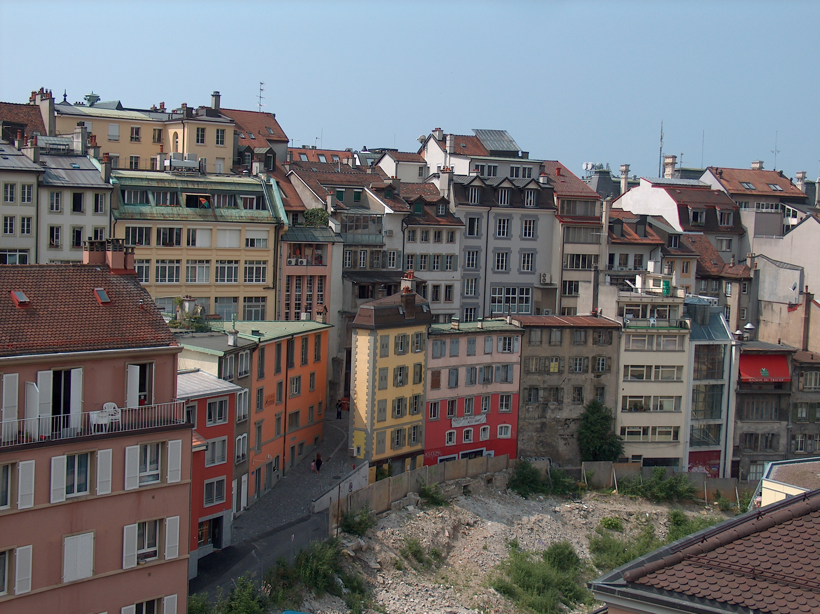 Rotillon à Lausanne Vue du pont Bessière Category: Category:Lausanne